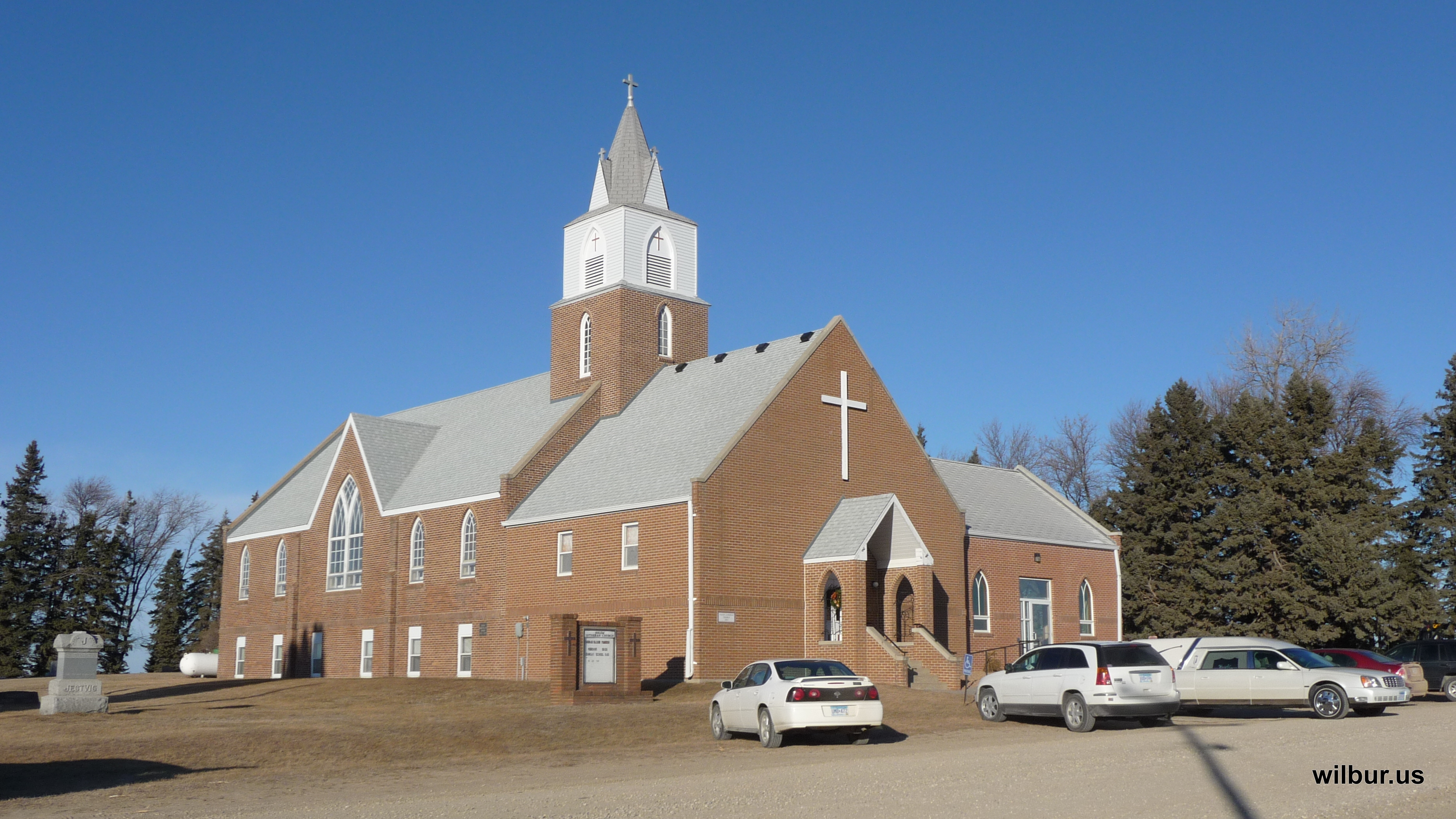 Solem Church